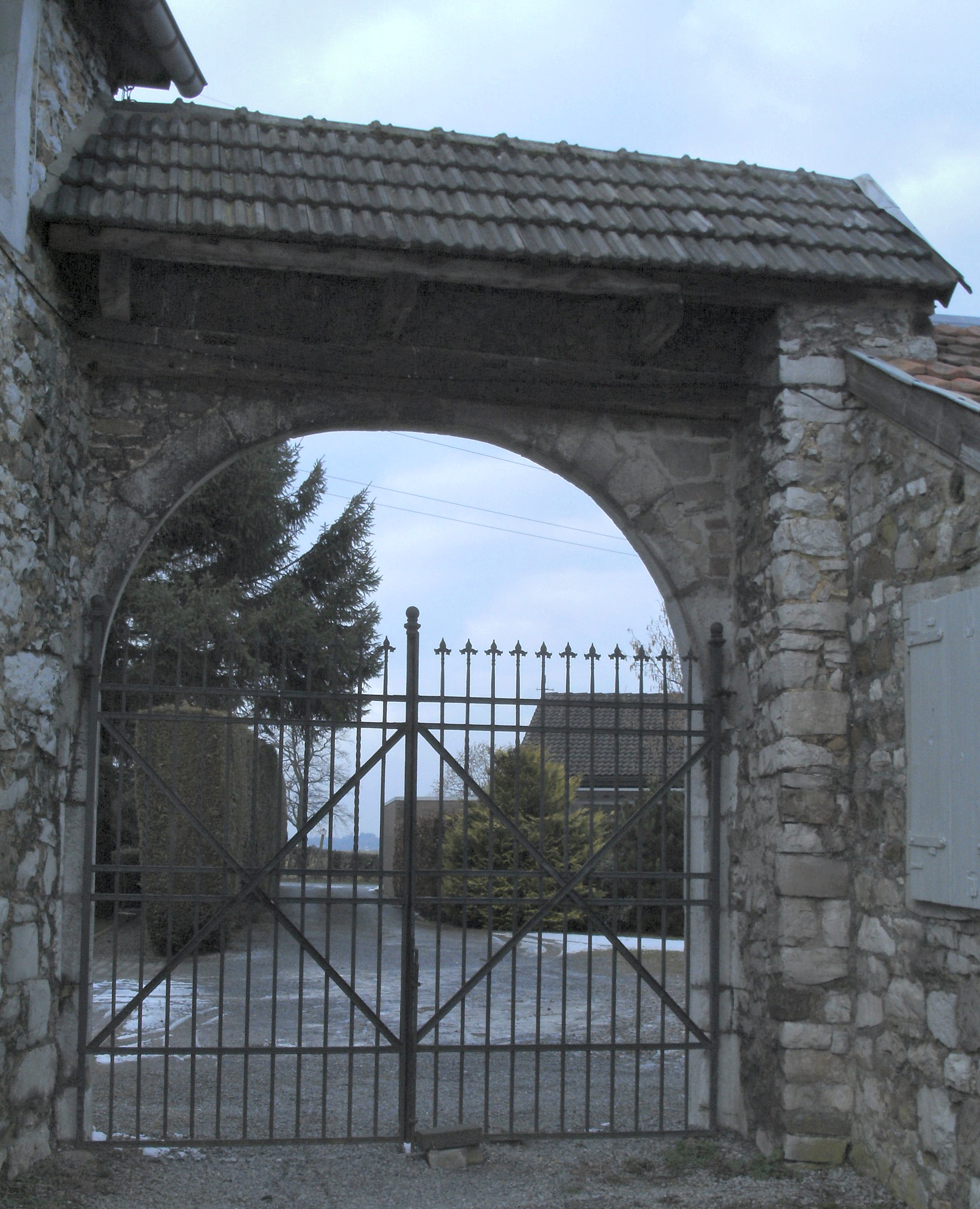 Tor der nicht mehr existierenden Burg Schwartzenburg in Dorff